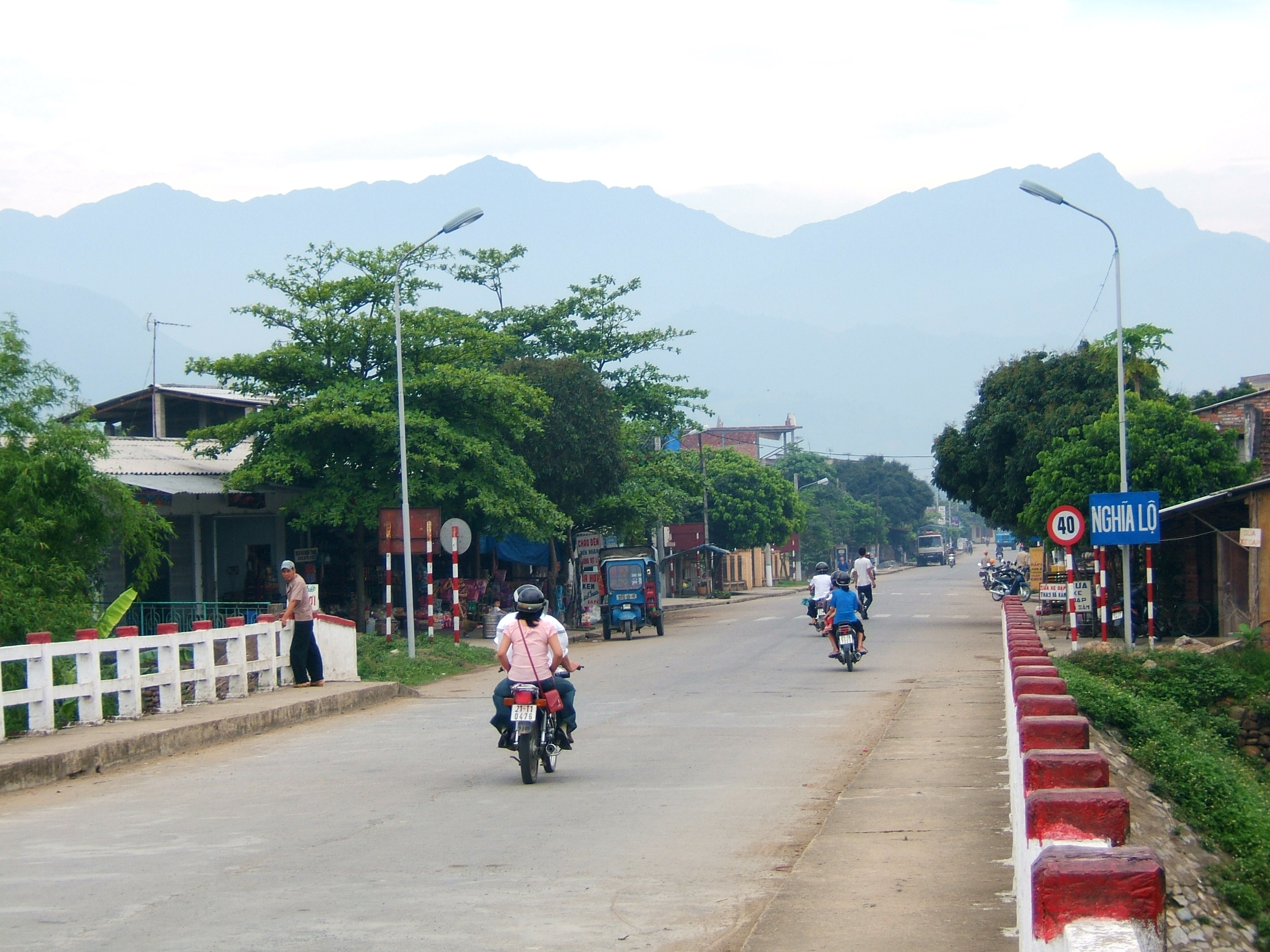 Địa phận thị xã Nghĩa Lộ